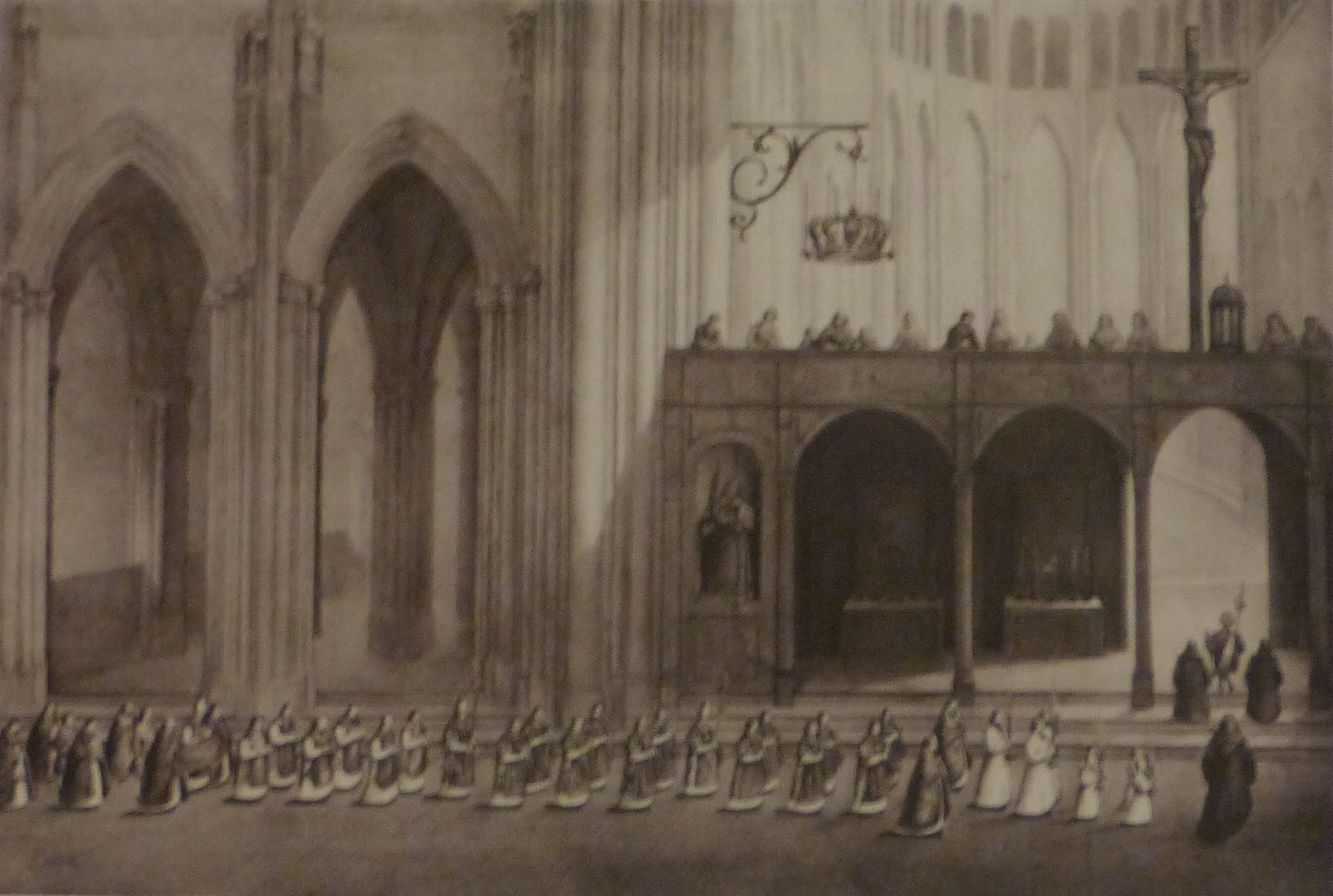 Reconstitution d'une procession passant devant le jubé de la Cathédrale Saint-Jean de Lyon, par Jean-Baptiste Marduel (XIXe siècle). Photographie floue de la photo de l'oeuvre conservée aux Archives municipales de Lyon, prise par le photographe des archives dans une collection privée, référencée : 1 C 450110 RES. Notes à l'arrière de la photo : avril 1986, [Recueil des cérémonie de l'Église de Lyon par l'abbé Jean-Baptiste Marduel (1765-1848)], lithographie planche 9, AM 450110 Rés ; archives municipales de Lyon, cliché n° 9880, reproduction interdite, photo J. Gastineau.